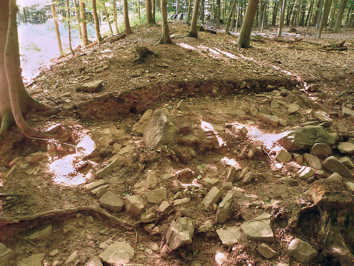 Ausgrabung im Bereich des Walls von Lager 1